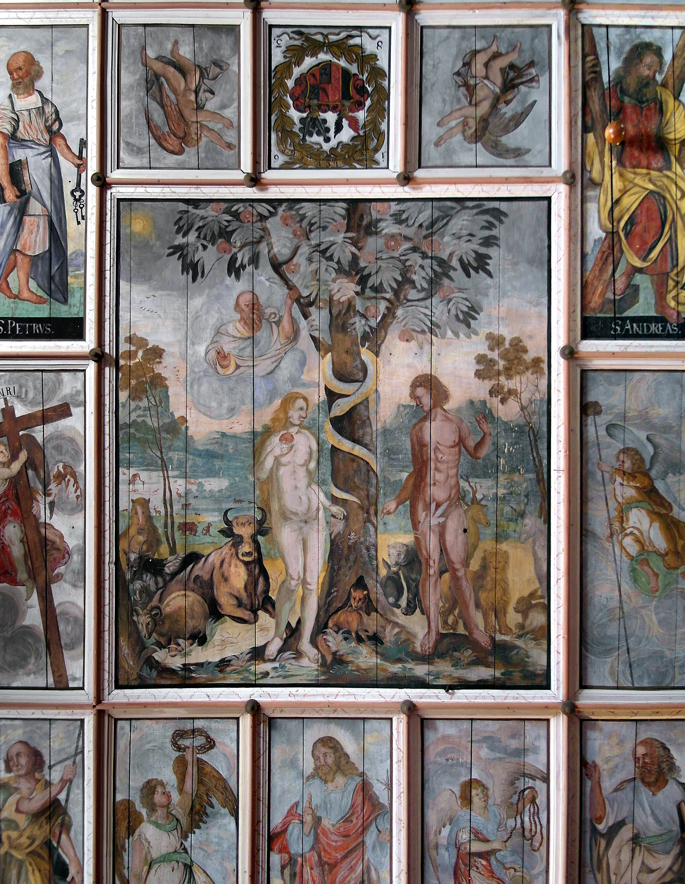 10.07.2015 01773 Schellerhau (zu Altenberg): Evangelische Dorfkirche (1593 geweiht), Matthäusweg 1 (GMP: 50.776638,13.790288). Die beiden großen Felder der bemalten Holzkassettendecke zeigen Adam und Eva (nach einem Motiv von Albrecht Dürer) und die Kreuzigung Jesu, umgeben von Aposteln, Evangelisten und Engeln mit Leidenswerkzeugen. [SAM1101.JPG]20150710335DR.JPG(c)Blobelt